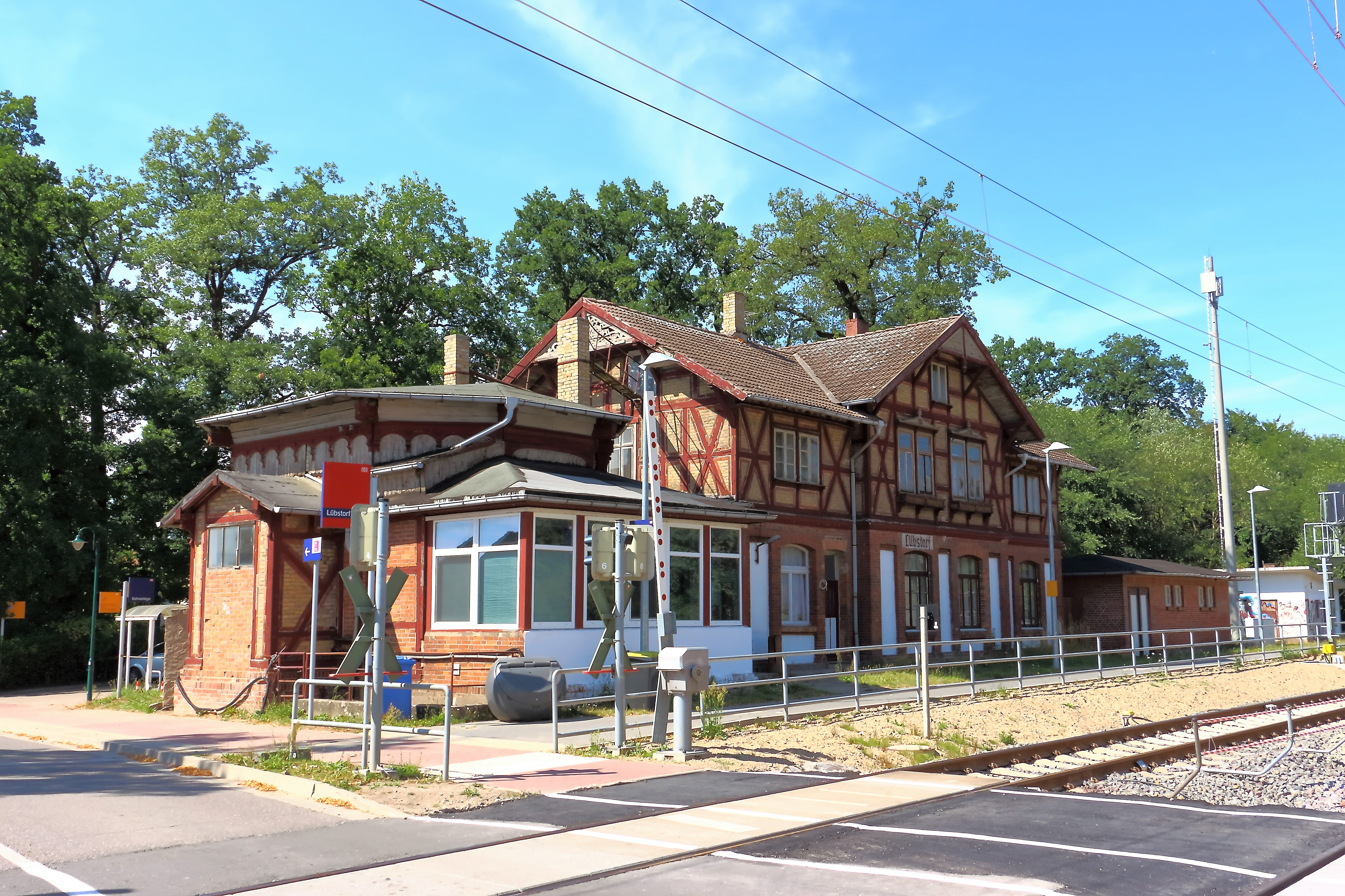 Ostfassade des ehemaligen Empfangsgebäudes Bahnhof Lübstorf bei Schwerin am 29. Juli 2018 - Bahnseite (modernisierter DB-Haltepunkt an zweigleisiger Bahnstrecke Rostock-Hamburg - Kursbuchstrecke 100 - 2 Bahnsteige und ein Fahrscheinautomat - das Stellwerk im Gebäude wurde nach Modernisierungsarbeiten durch ein ESTW 2018 ersetzt und das Gebäude an eine Privatperson verkauft)